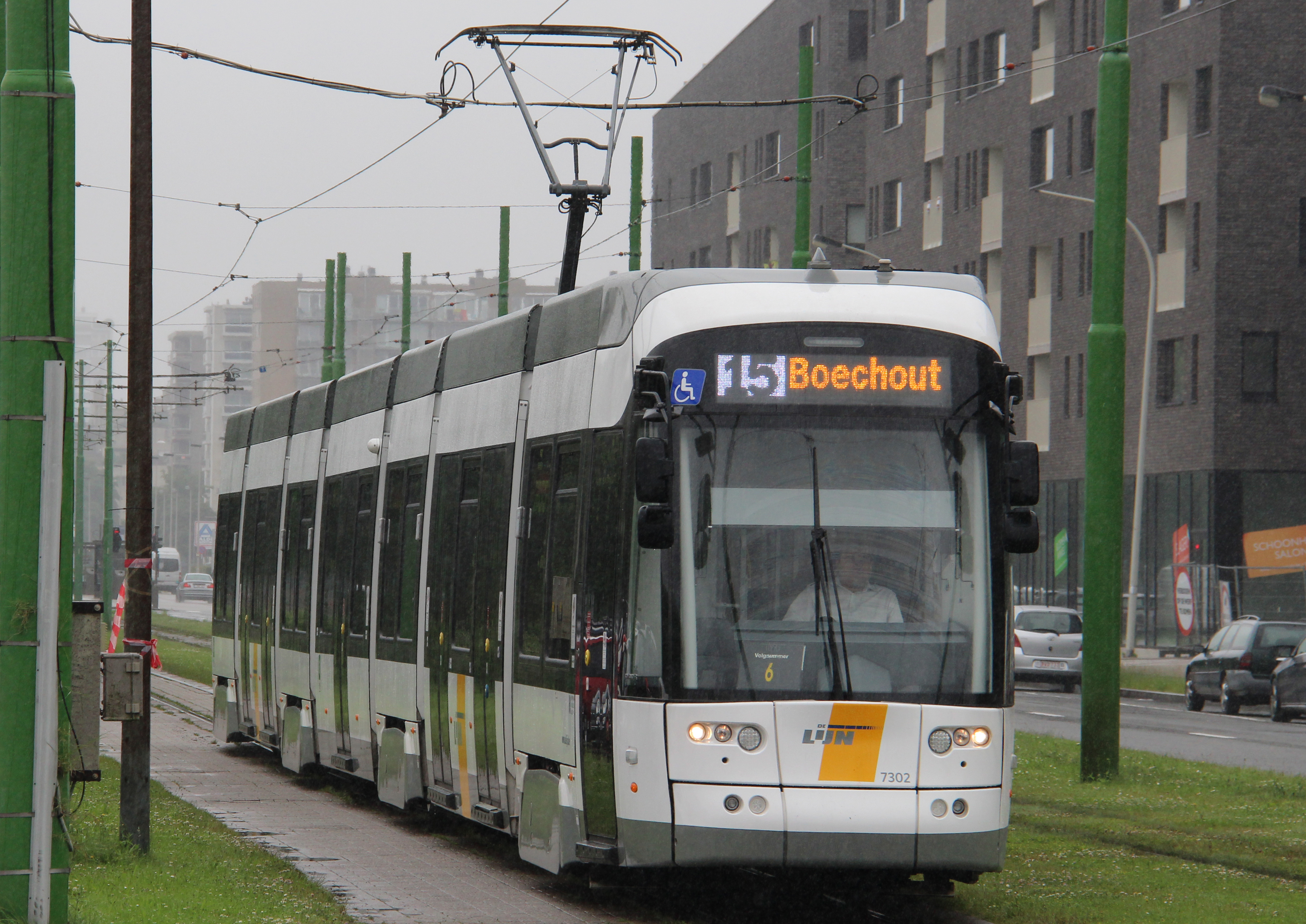 Een 7-delige Albatrostram bij het eindpunt Linkeroever van lijn 15.